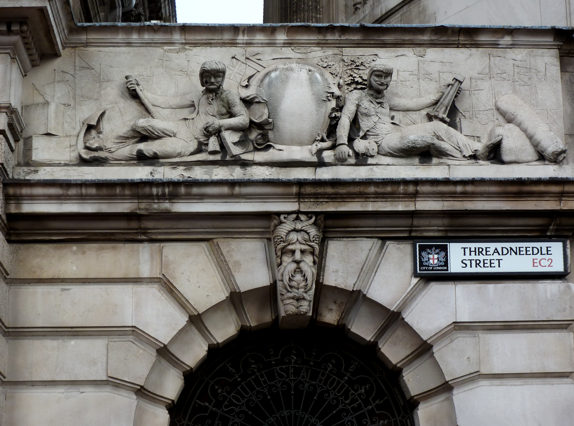 Threadneedle Street, London. Portal mit Relief des früheren South Sea House. Aufnahme vom Oktober 2011. Die gleichnamige Handelsgesellschaft machte von sich reden im 18. Jahrhundert im Zusammenhang mit dem Sklavenhandel und der Finanzkrise "South Sea Bubble".